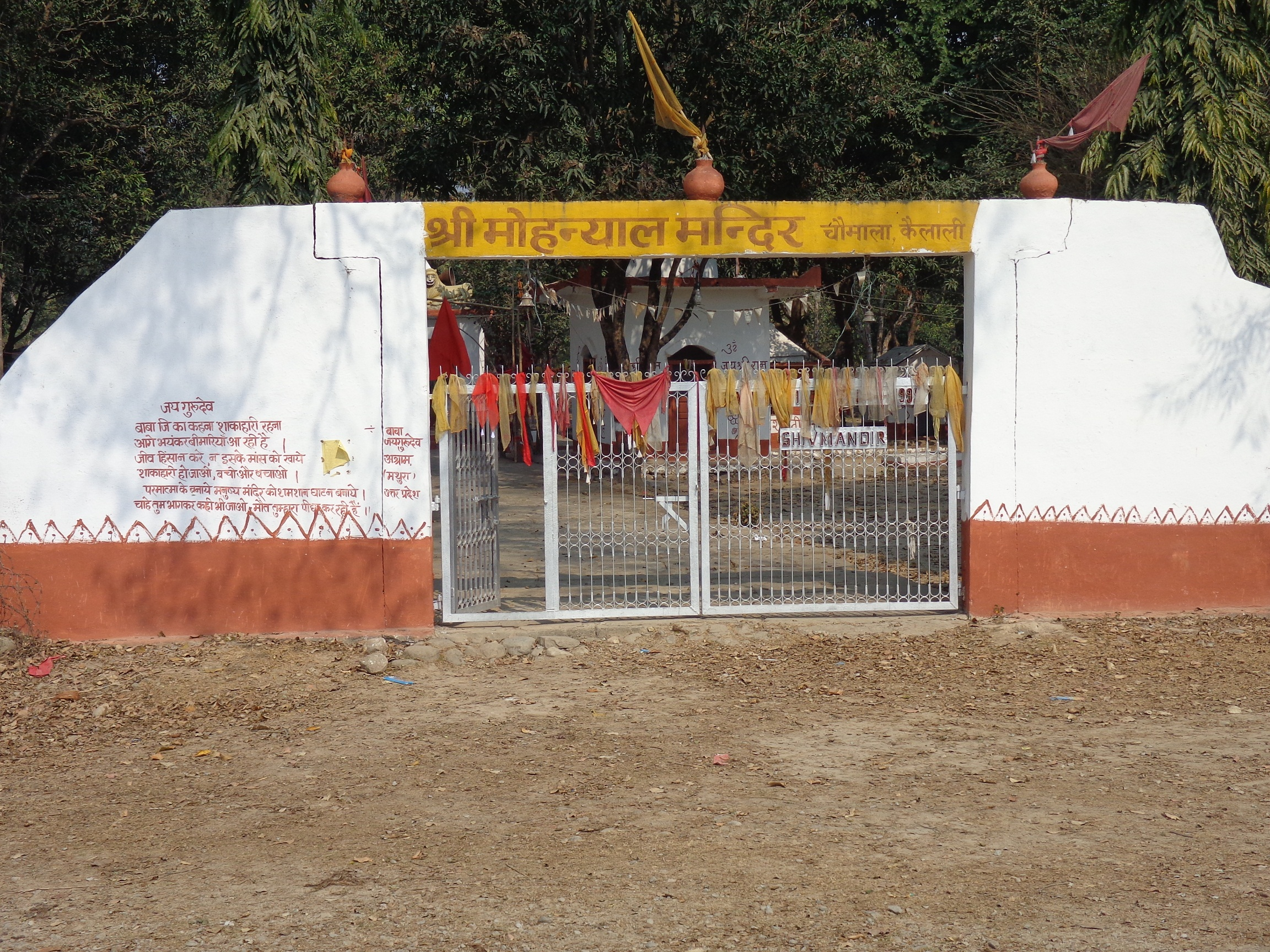 नेपाल भाषा: Mohanyal Mandir Chaumala